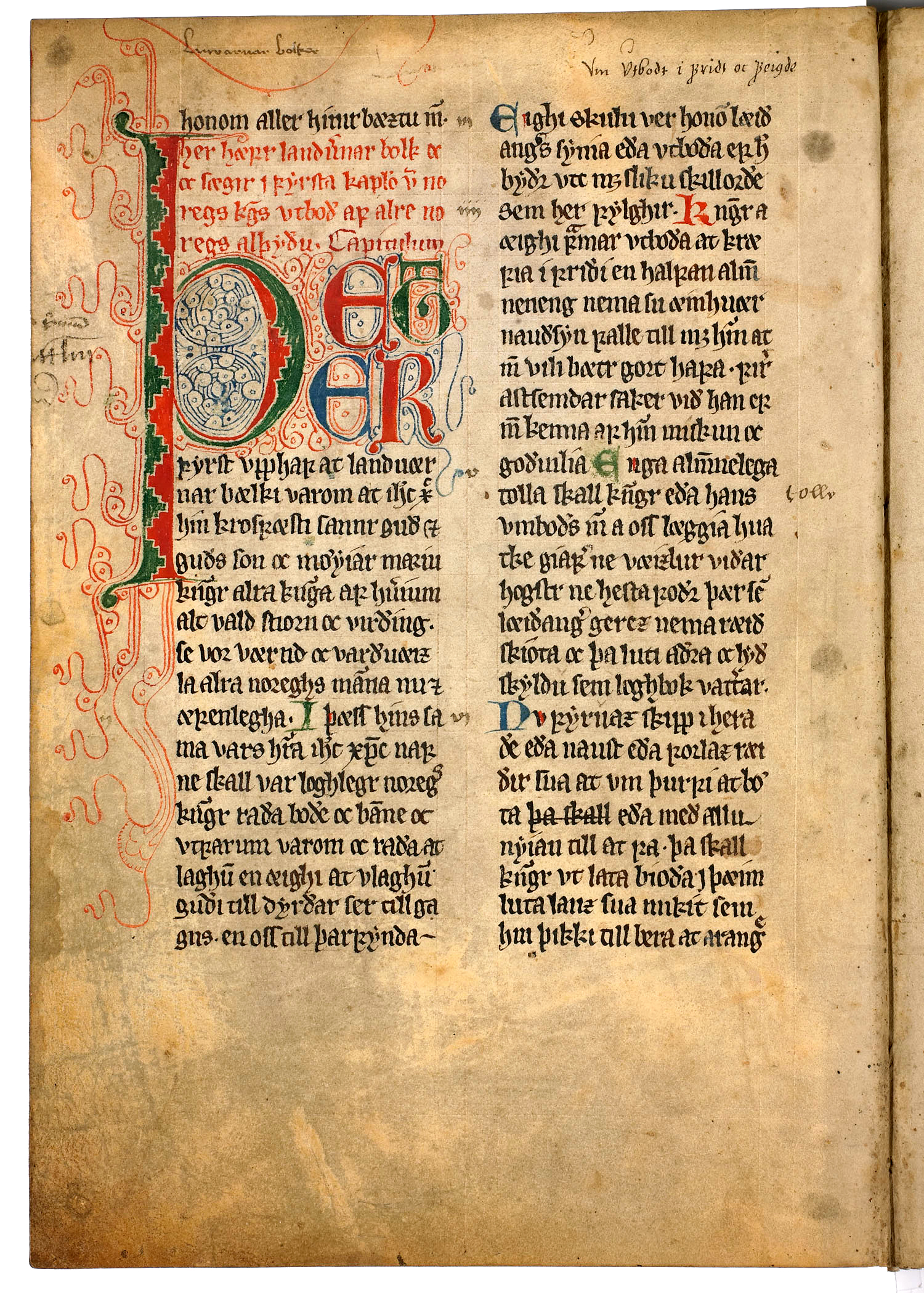 Magnus Lagabøtes landslov. AM 305 fol, bl. 10v.